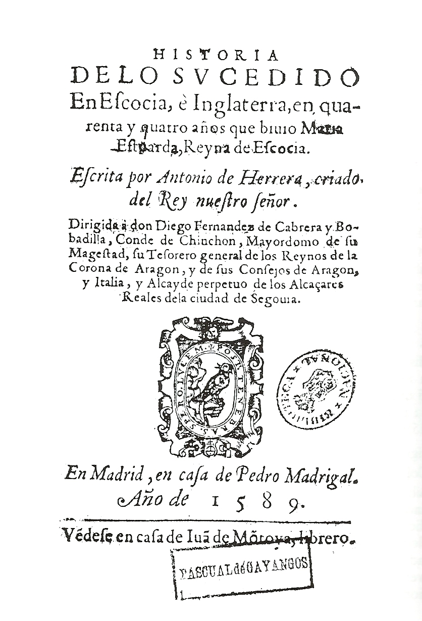 Portada de una obra referente a Escocia, escrita por Antonio de Herrera y Tordesillas.